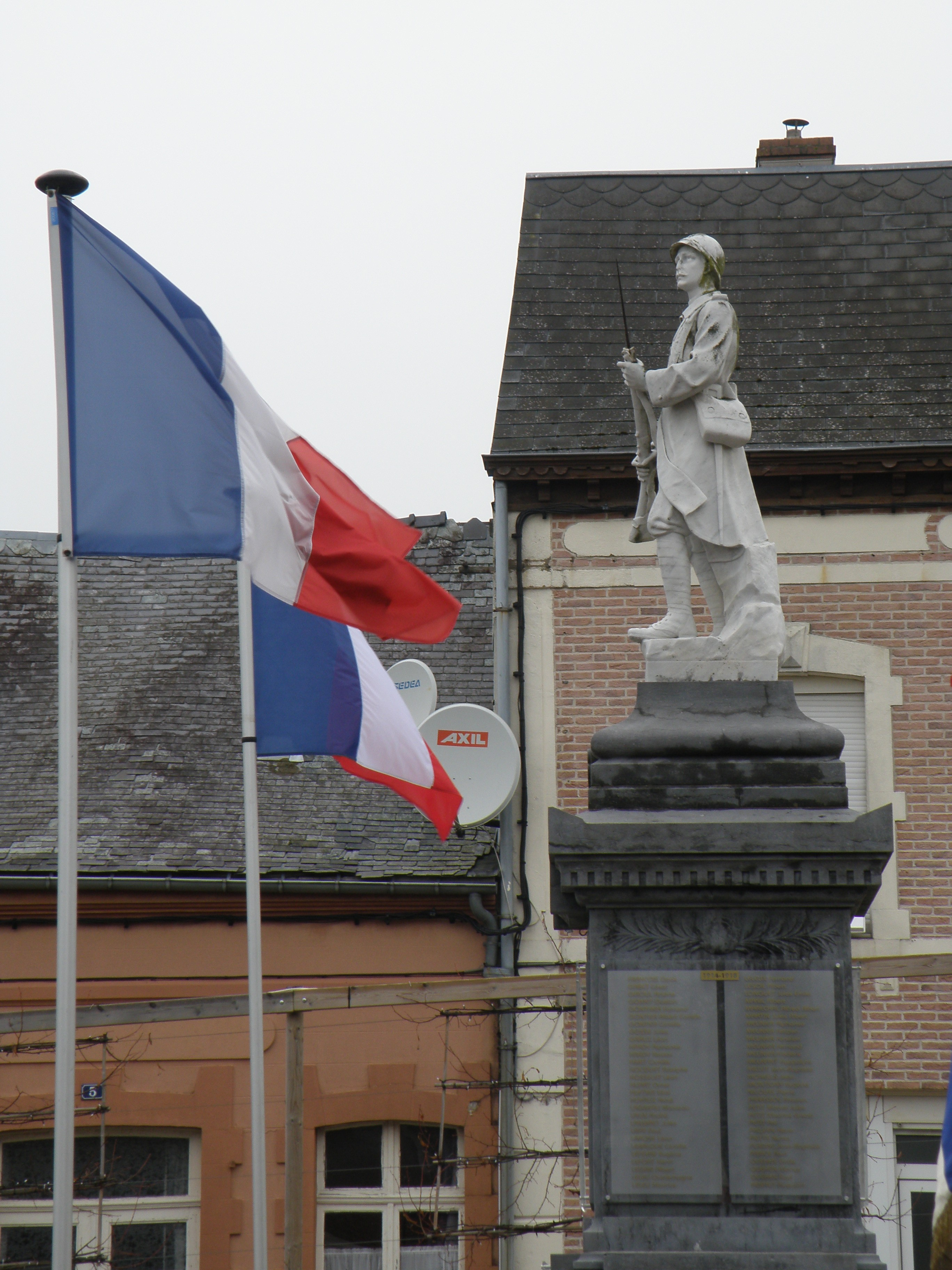 Photo de la statue du poilu qui se trouve sur la place du même nom, devant la mairie d'Anor (59).